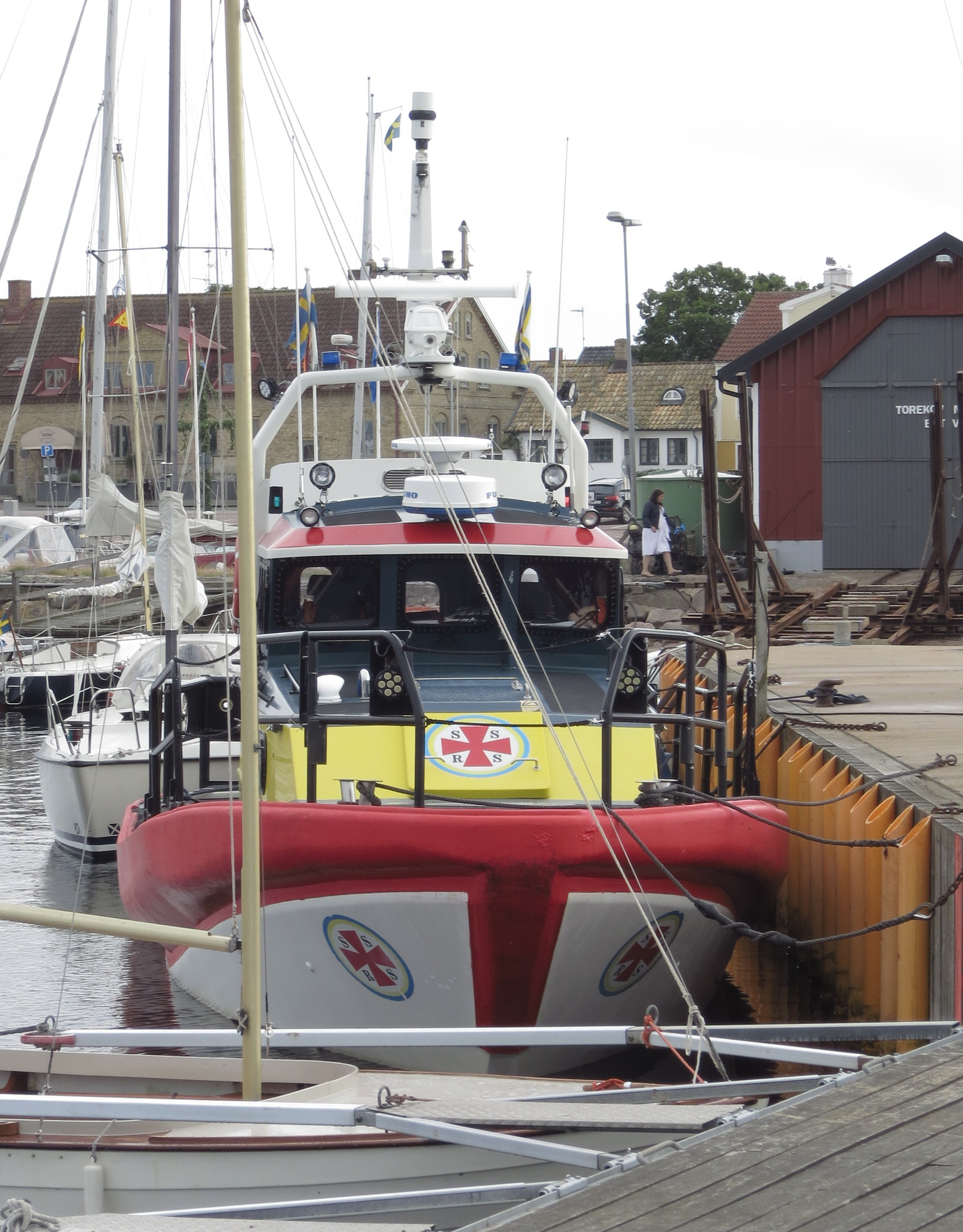 Rescue Gripen i Torekov